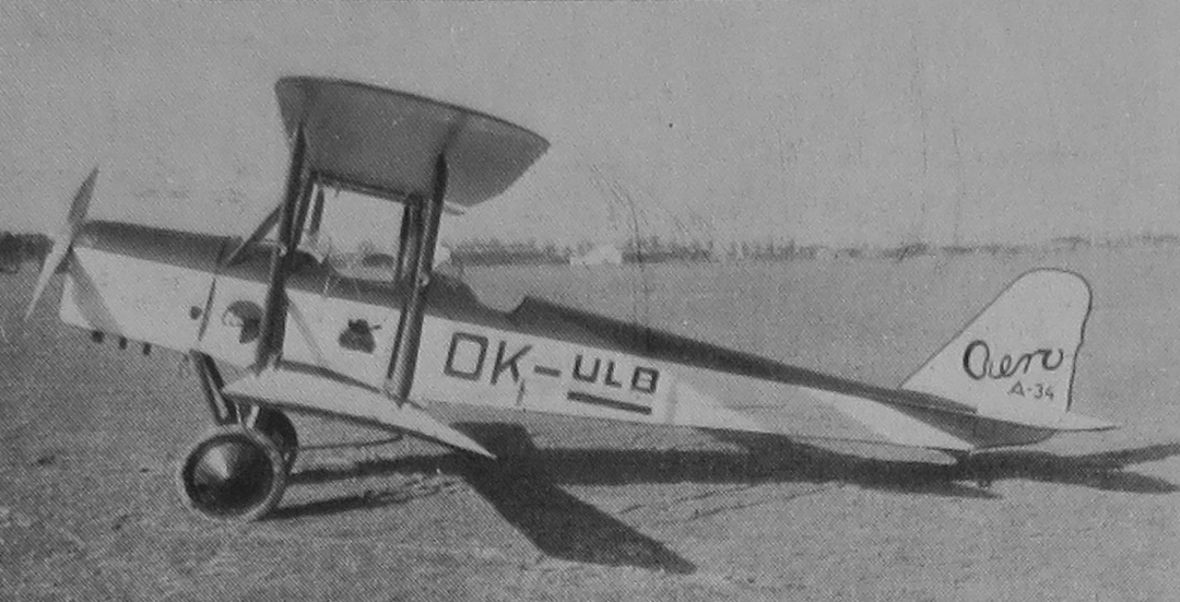 letecký motor Walter Junior 4 a letoun Aero A-34